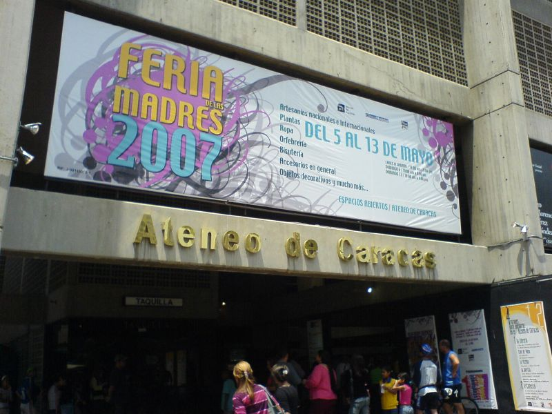 Caracas Athenaeum Building, Caracas, Venezuela.